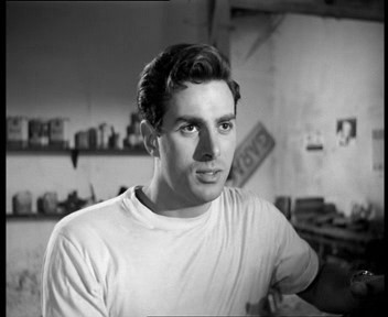 Screenshot del film Le ragazze di San Frediano (1954) di Valerio Zurlini.